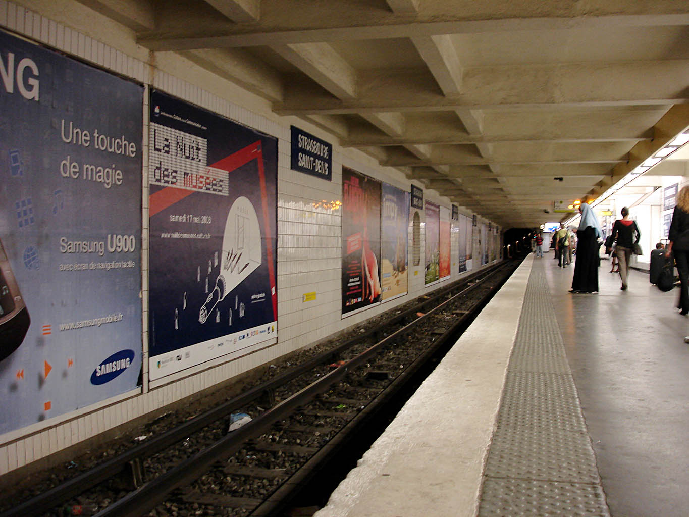 Station Strasbourg - Saint-Denis de la ligne 9 du métro de Paris, France.